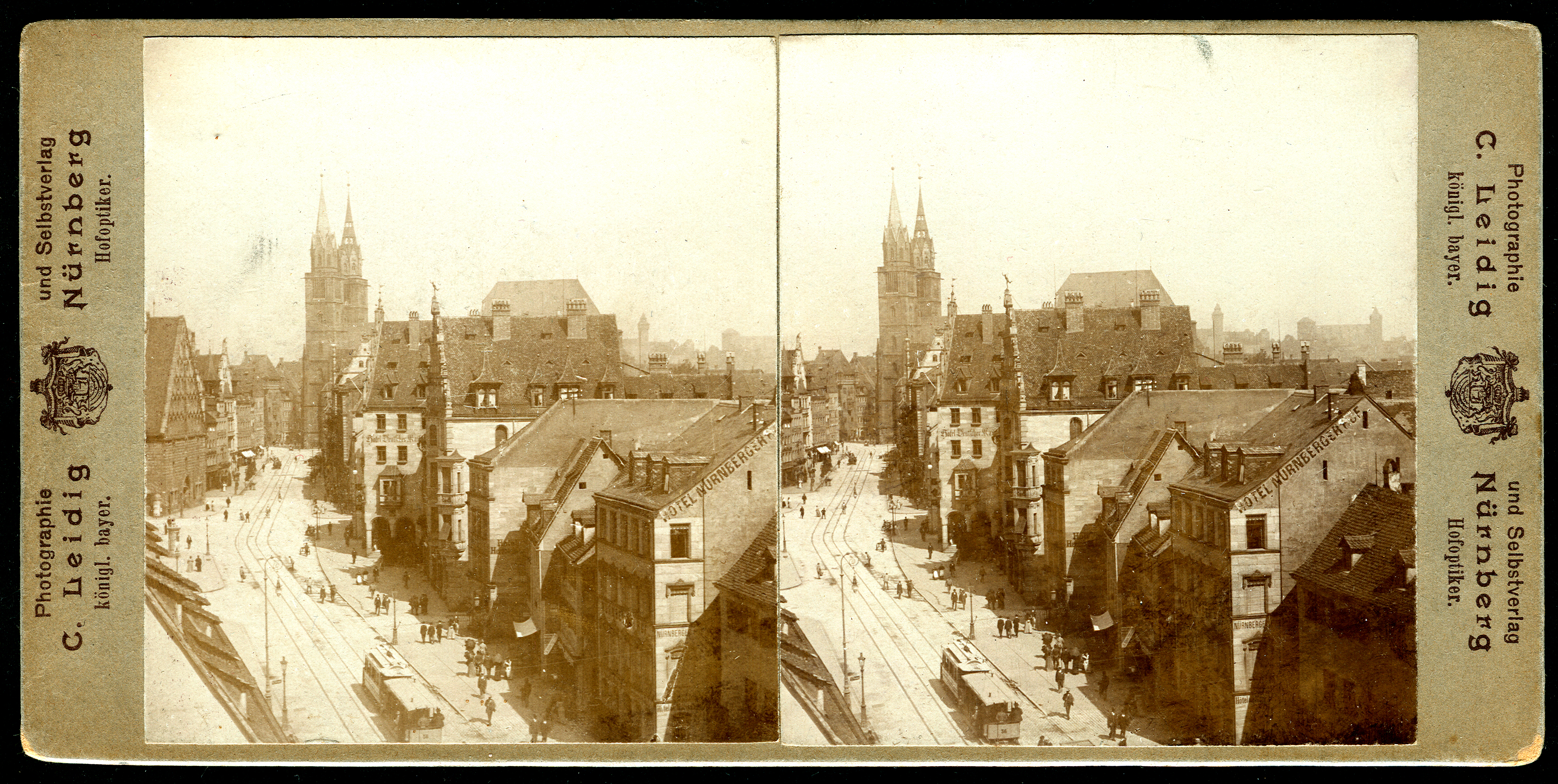 Stereoskopie im Selbstverlag des Fotografen und königlich bayerischen Hofoptikers Carl Leidig aus der Zeit um 1900, hier ein Blick vom Dach der Mauthalle in Nürnberg vorbei an der Straßenbahn und dem Hotel Nürnberger Hof, dem Hotel Herzog Max (?) und dem Hotel Deutscher Kaiser zu den historischen Gebäuden rund um die noch unzerstörte gotische Kirche St. Lorenz ...